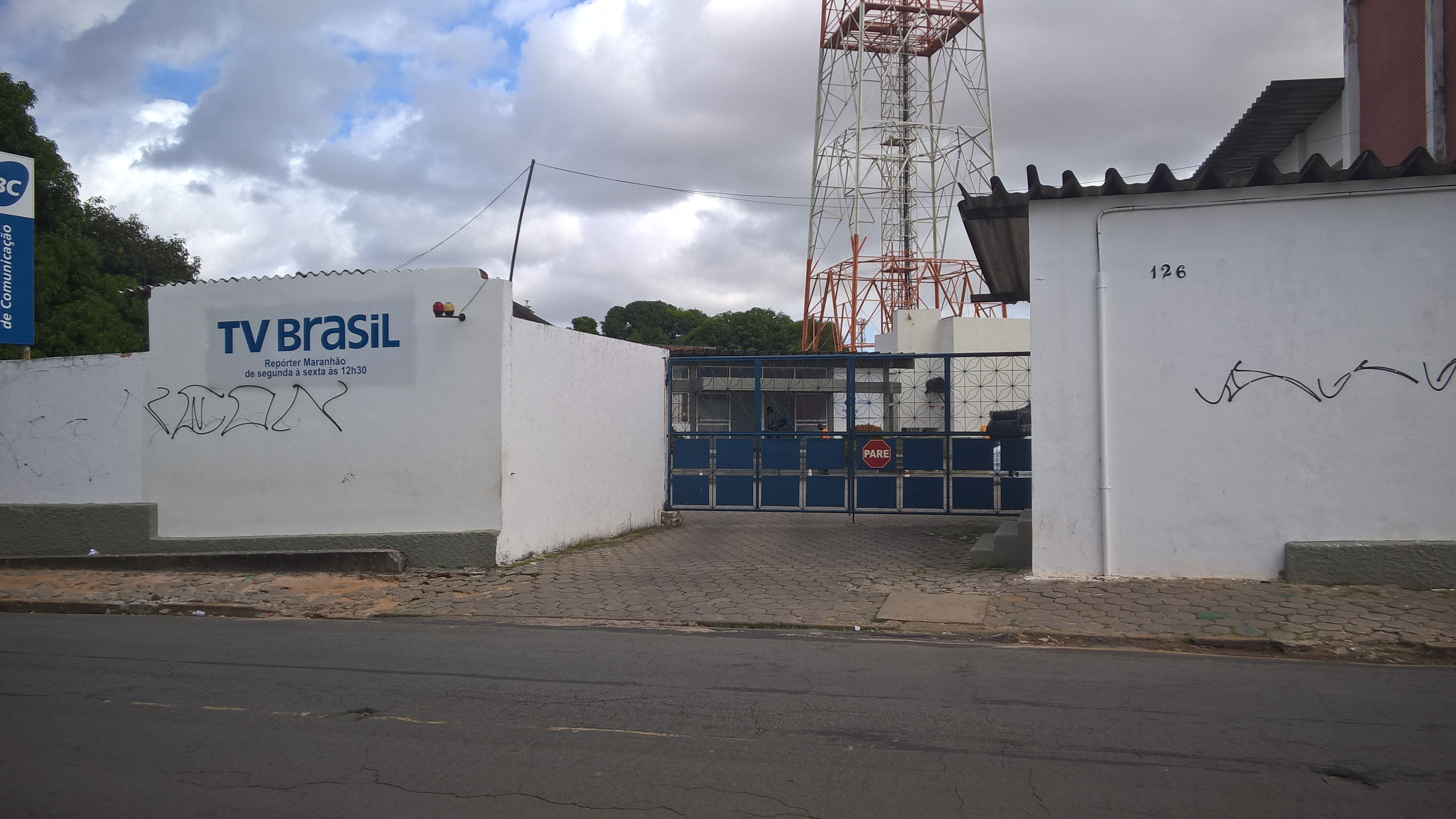 Sede da TV Brasil Maranhão, emissora de televisão sediada em São Luís, MA - Brasil.